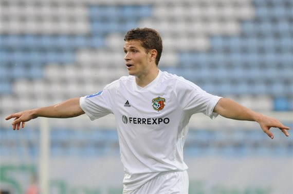 Артем Громов - український футболіст, гравець Ворскли